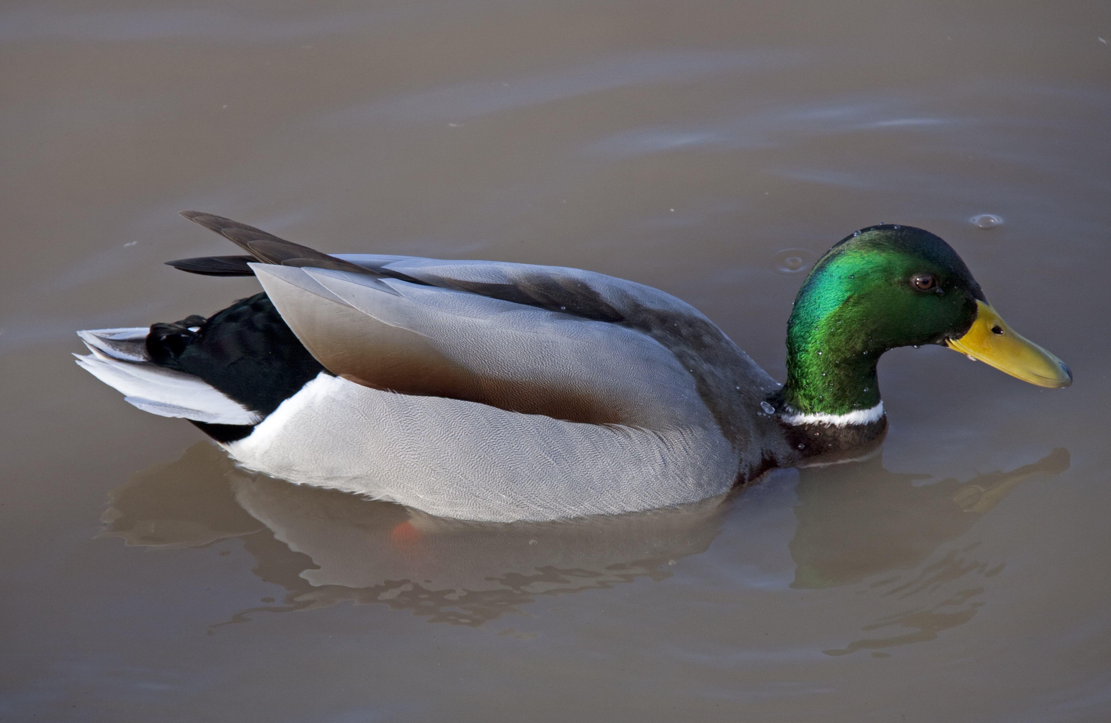 Mallard 1c